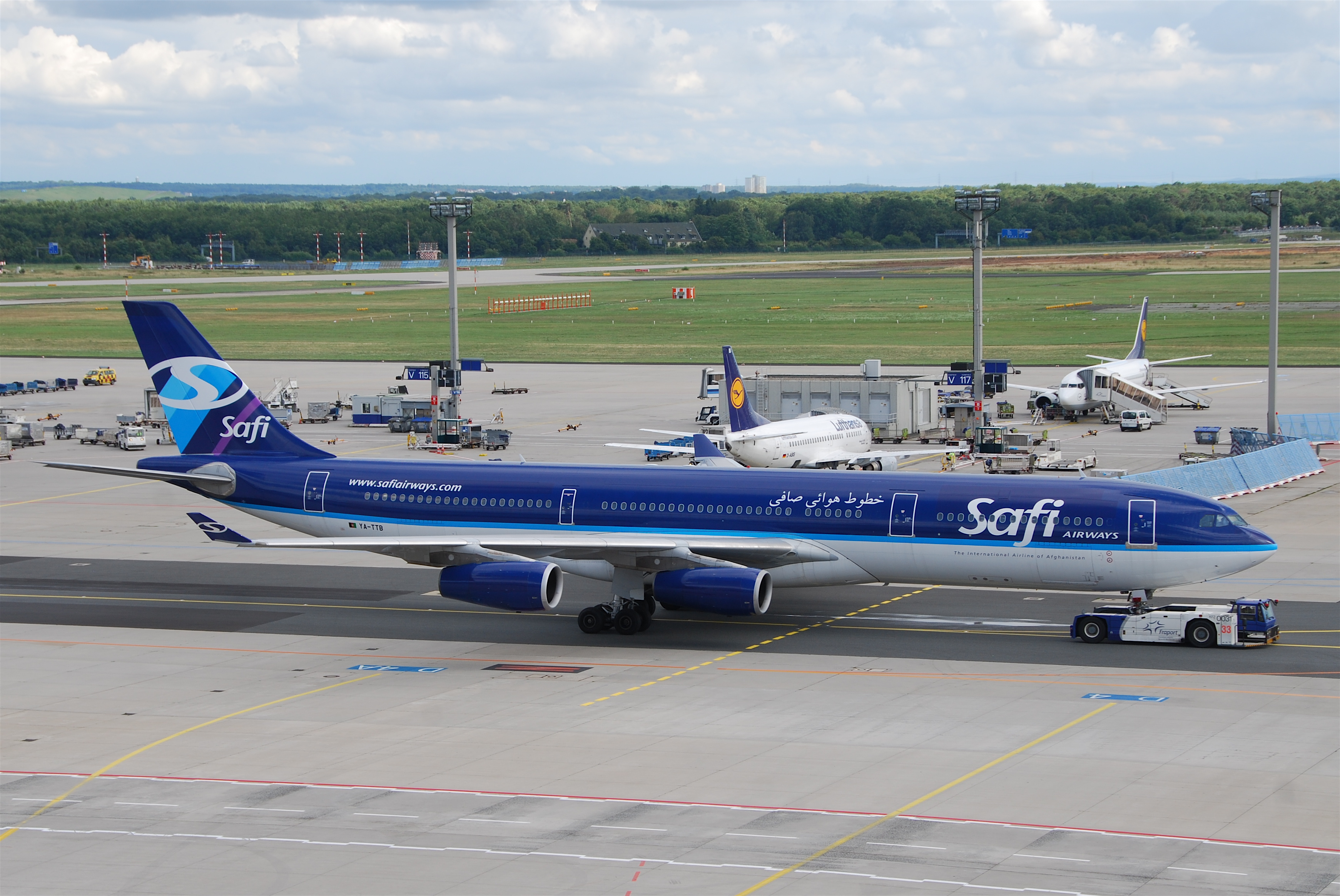 Safi Airways Airbus A340-300; YA-TTB@FRA;08.08.2010/585ad